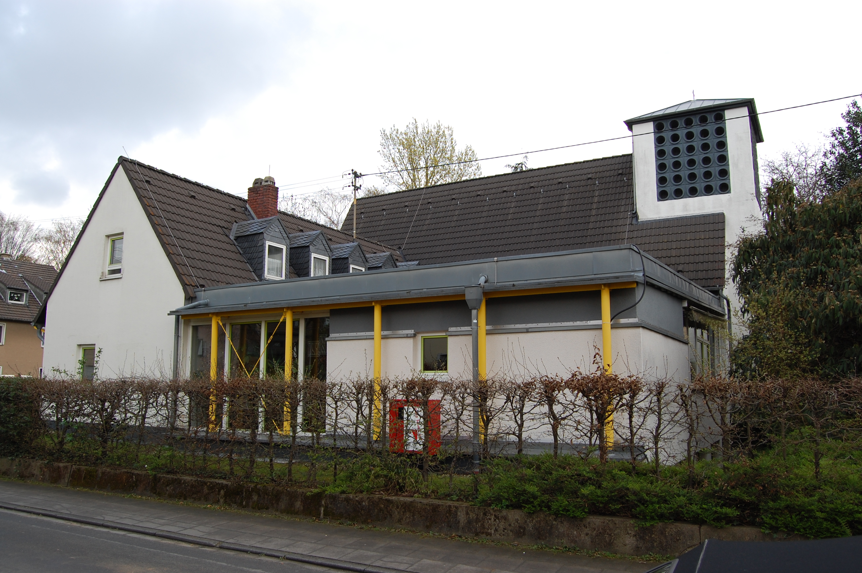 Friedenskirche, Hürth-Efferen; Kirchengebüde und Gemeindehaus